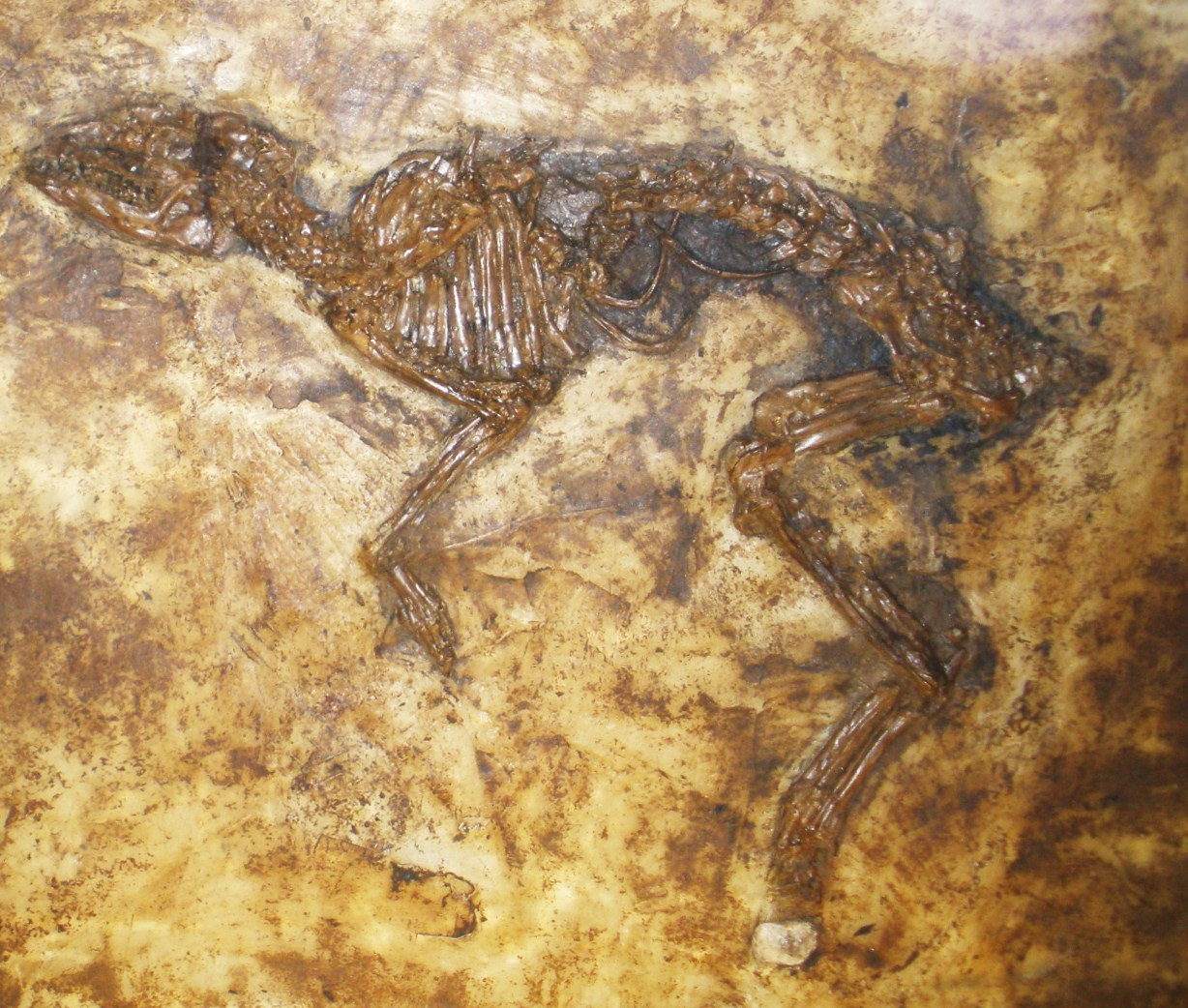 Fossil of Messelobunodon, an extinct mammal- Took the photo at Senckenberg Museum of Frankfurt